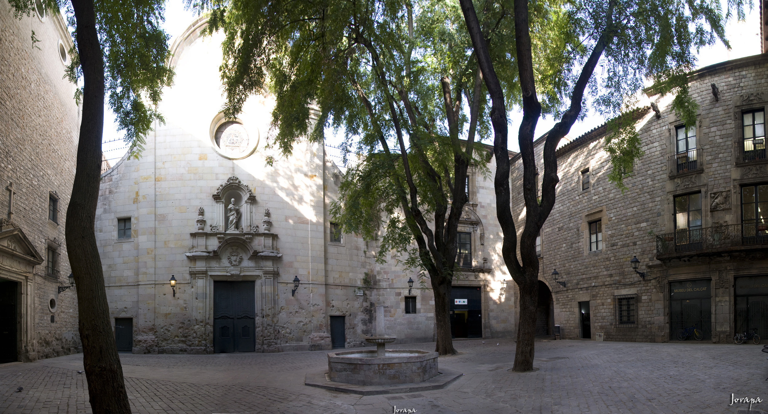 Casa del Gremi dels Calderers (Barcelona)